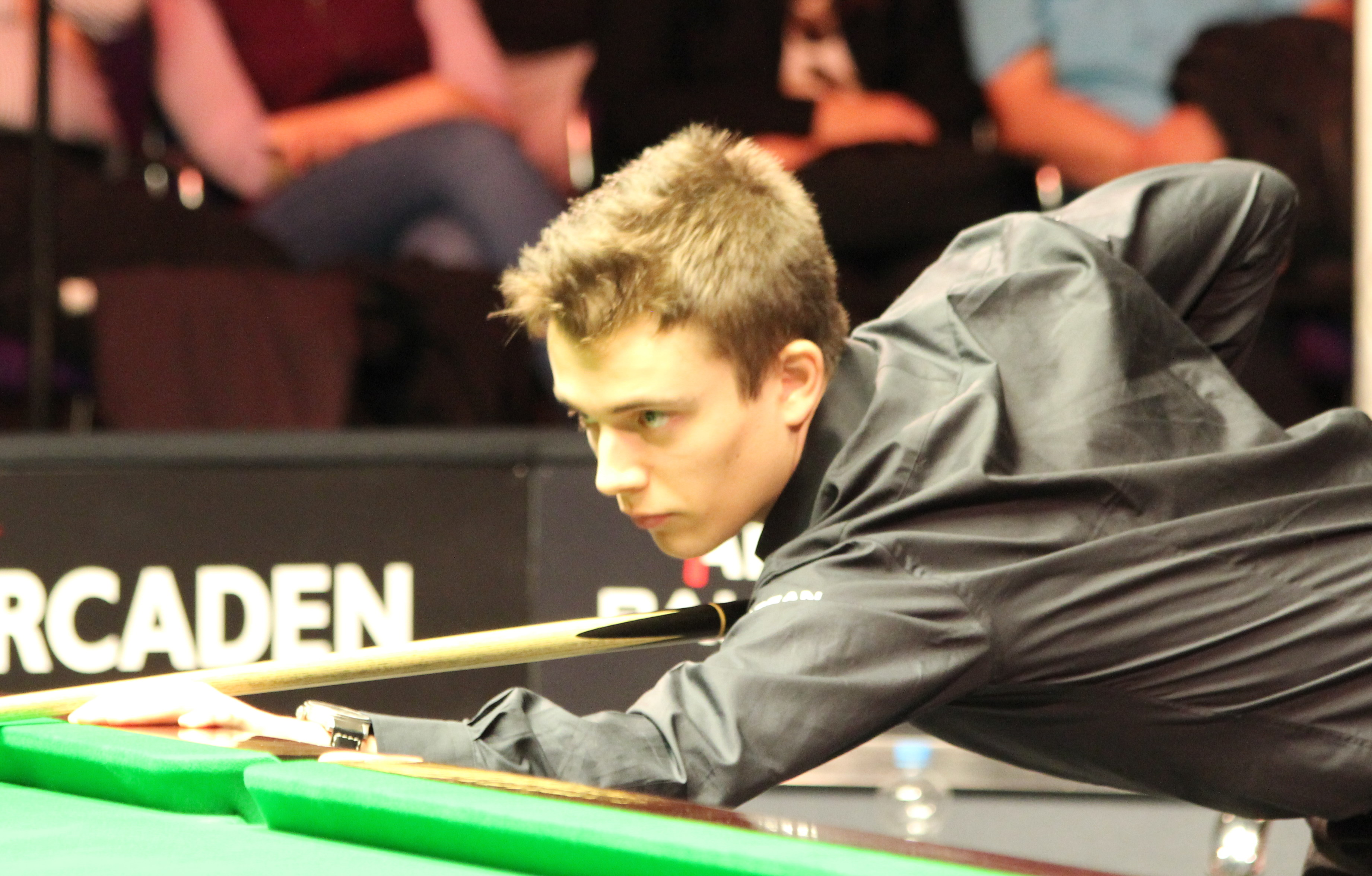 Alexander Ursenbacher beim Paul Hunter Classic 2014